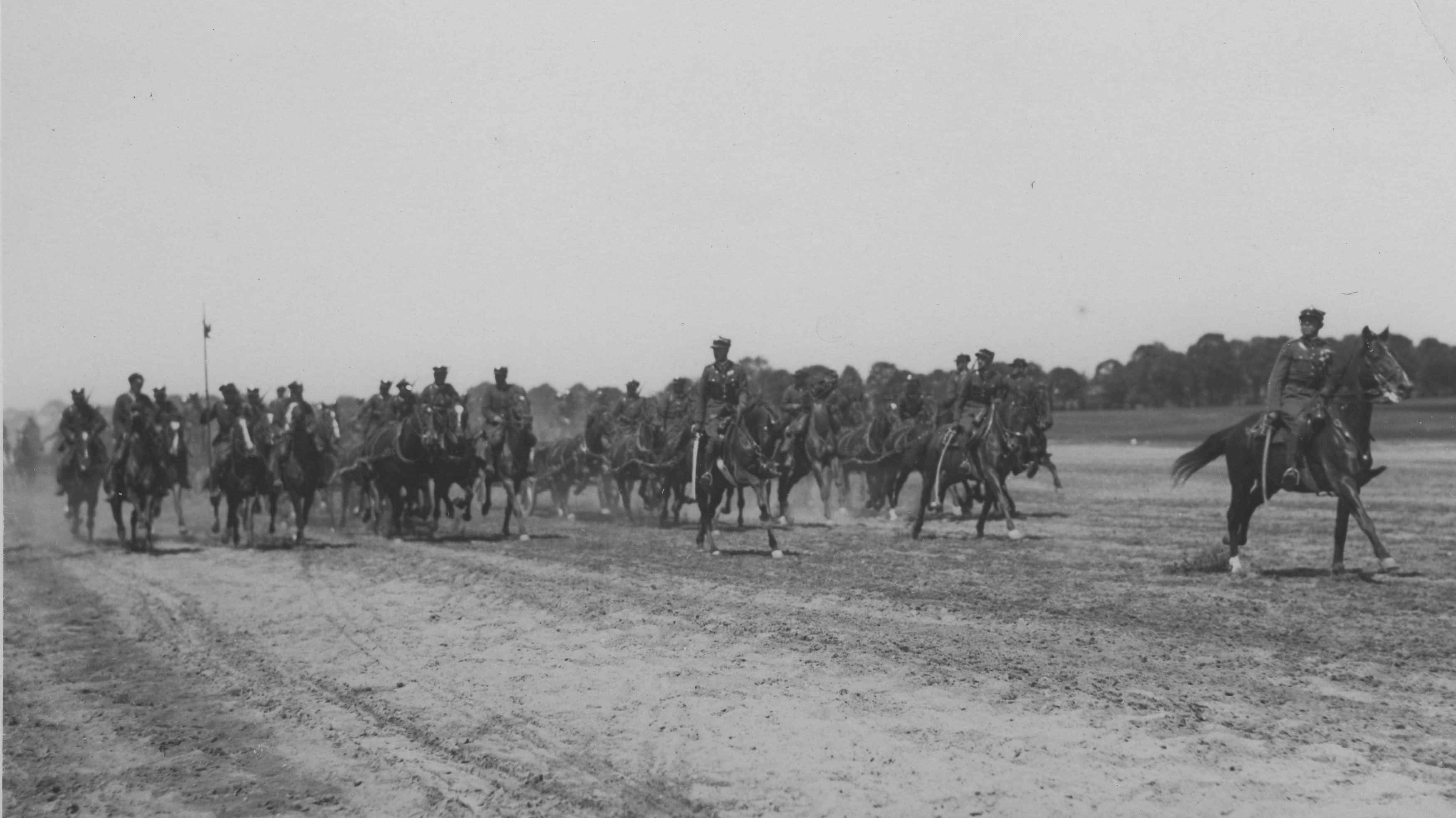 XV rocznica powstania 7 Dywizjonu Artylerii Konnej w Poznaniu; czerwiec 1934. Fragment defilady 7 DAK-u w galopie. Koncern Ilustrowany Kurier Codzienny - Archiwum Ilustracji. Sygnatura: 1-W-1479-4